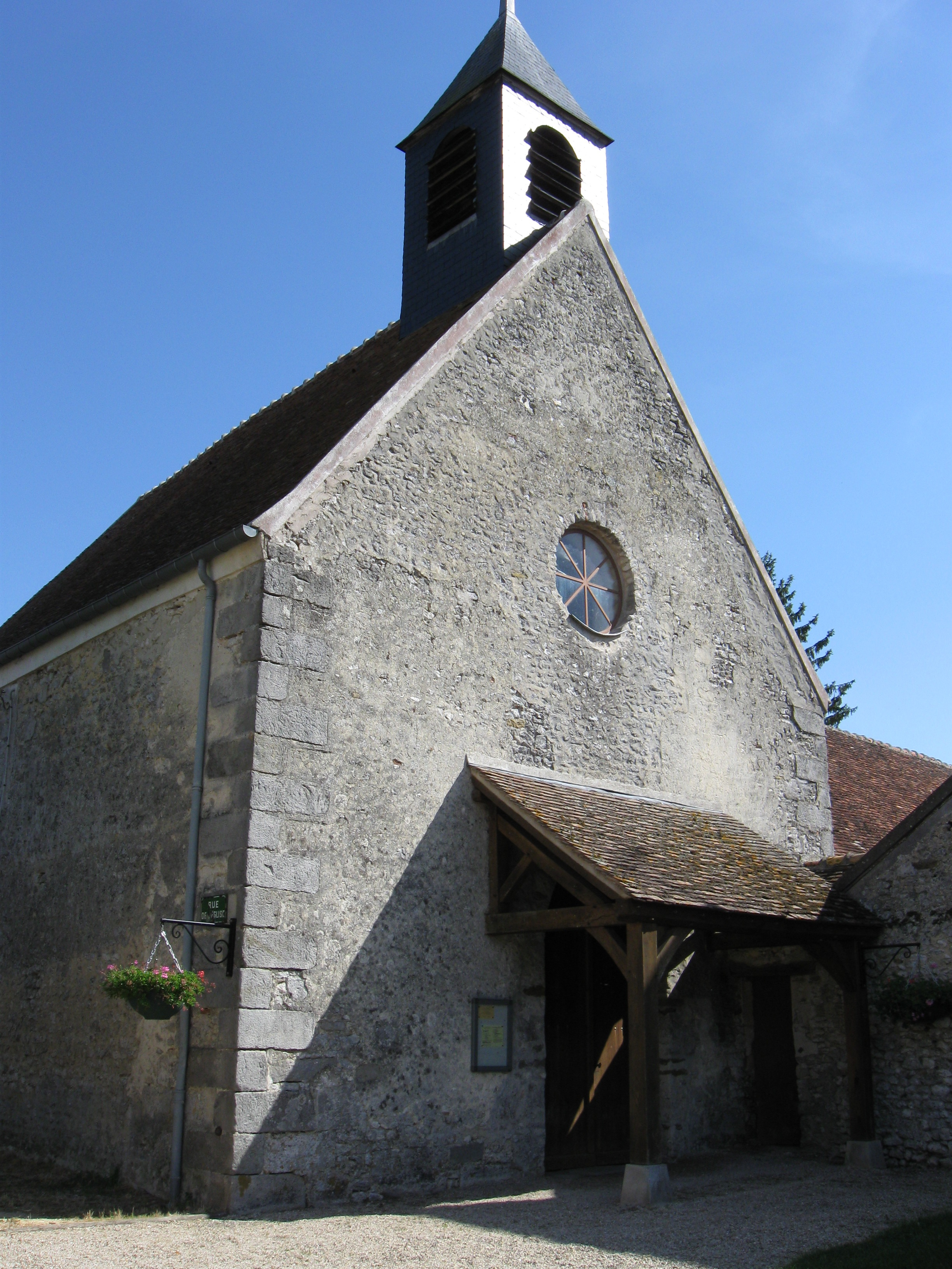 Église Saint-Gond de Châteaubleau. (département de la Seine et Marne, région Île-de-France).